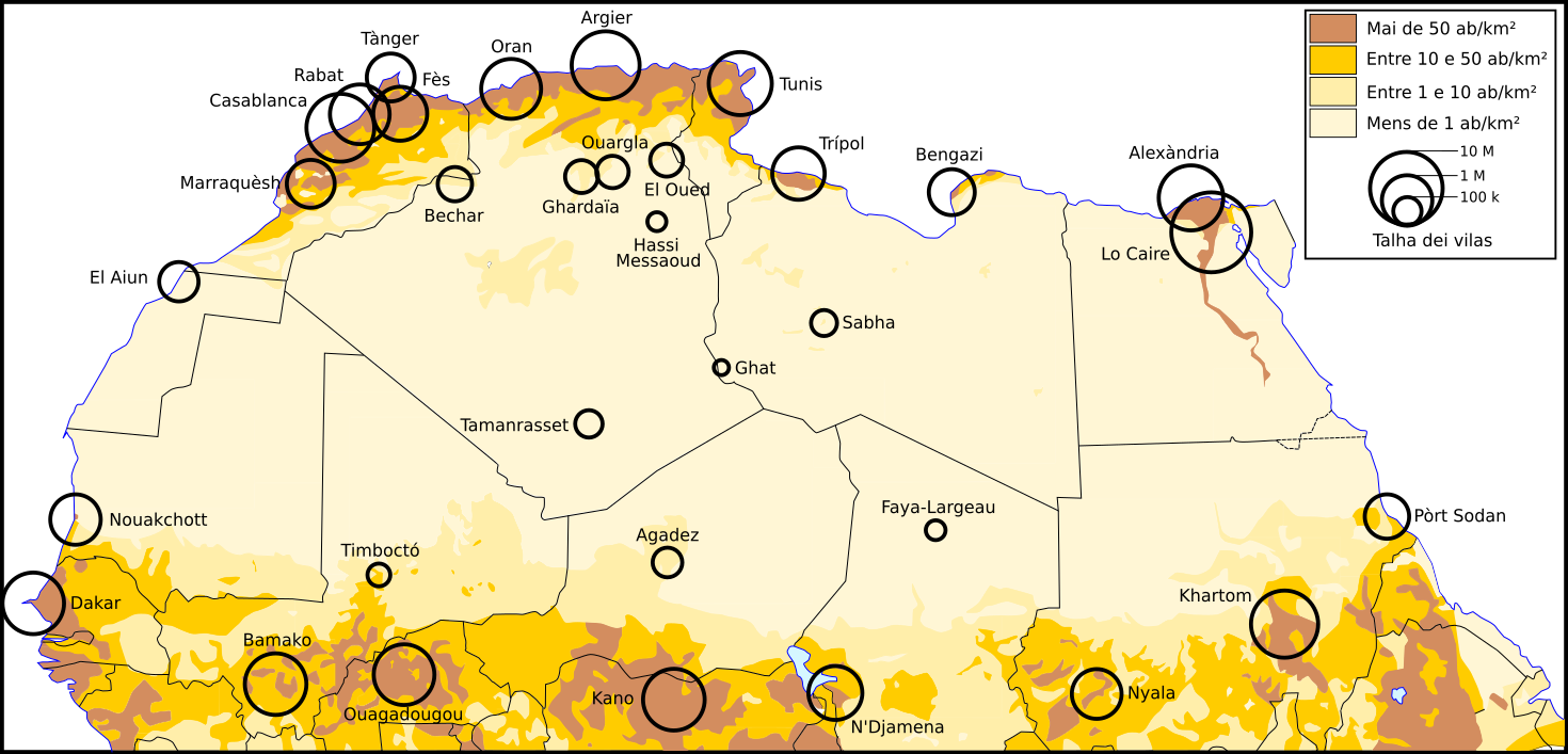 Demografia de Sahara.